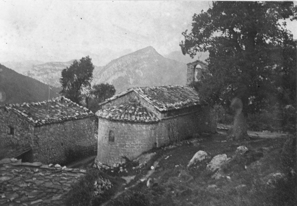 Església de Nostra Senyora de les Agulles, a Montagut i Oix. Cèsar August Torras i Ferreri (Entre 1890 i 1923) This is a a photo of a natural area in Catalonia, Spain, with id: ES510085